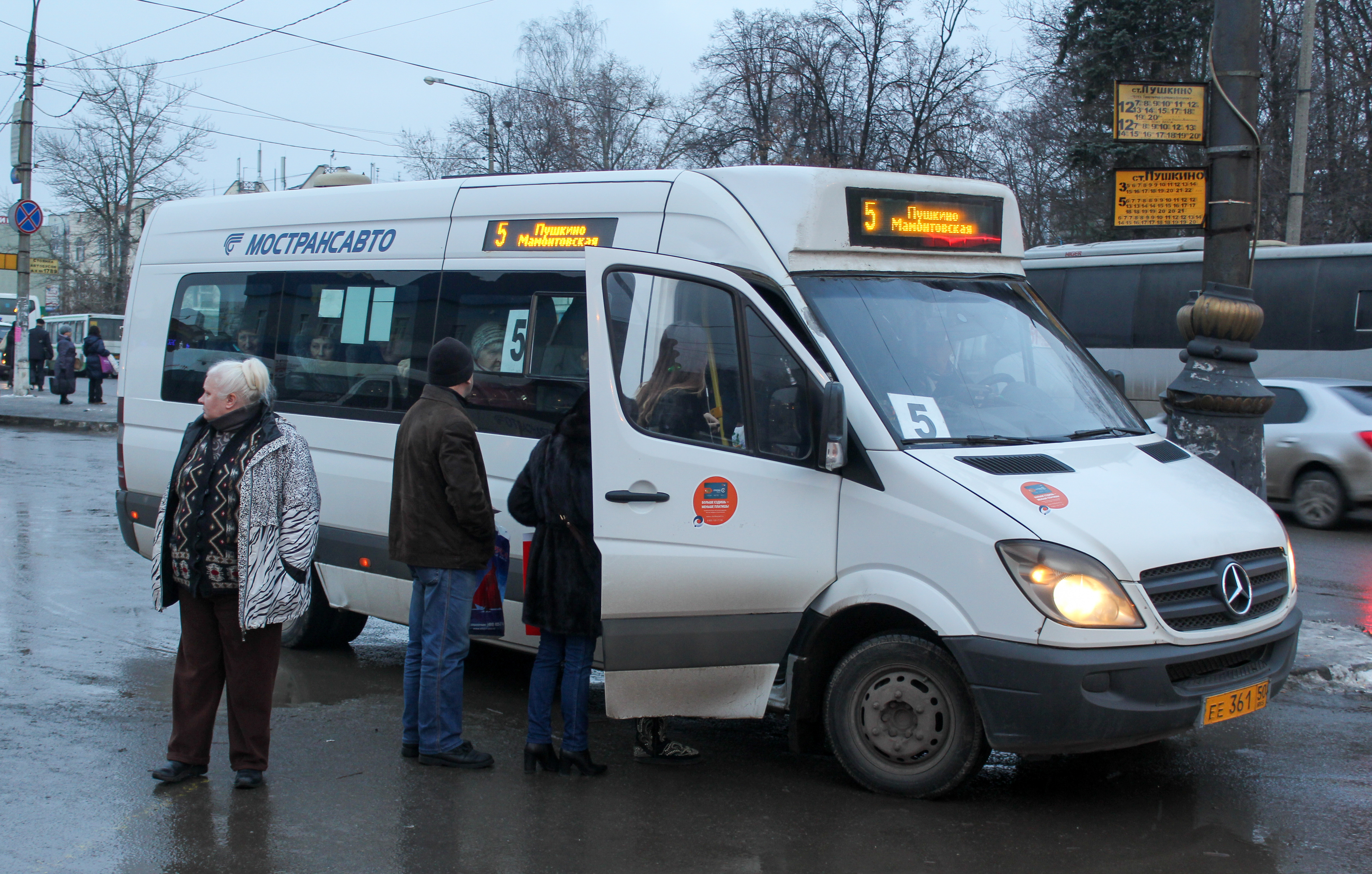 Микроавтобус Мострансавто в Пушкино